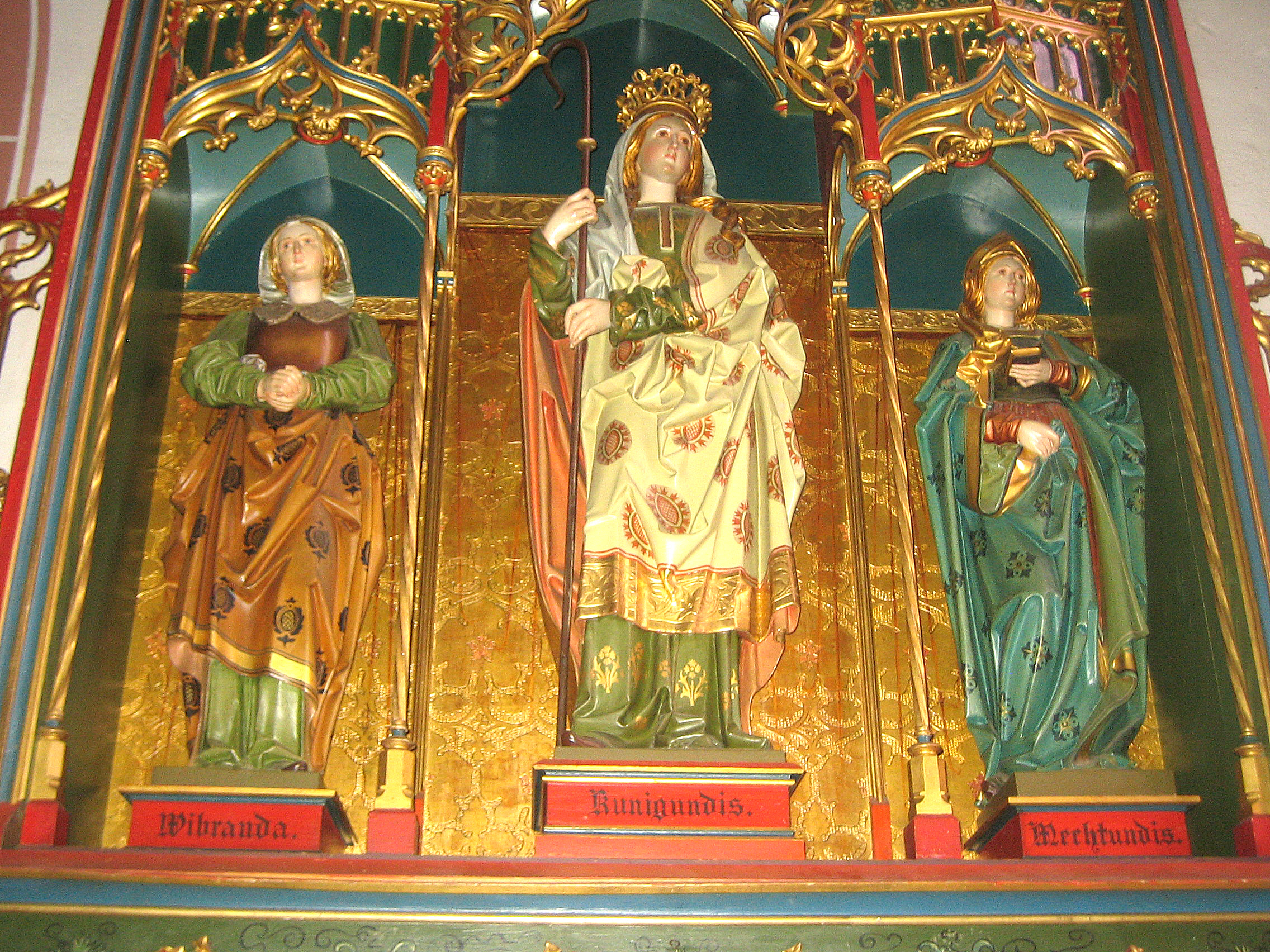 Seitenaltar in der St. Gallus Kirche in Obereichsel mit den Statuen der drei heiligen Jungfrauen. Die Statuen stammen aus dem 18. Jahrhundert. Im dem darunter befindlichen Altar sind die Reliquien der drei Jungfrauen untergebracht.